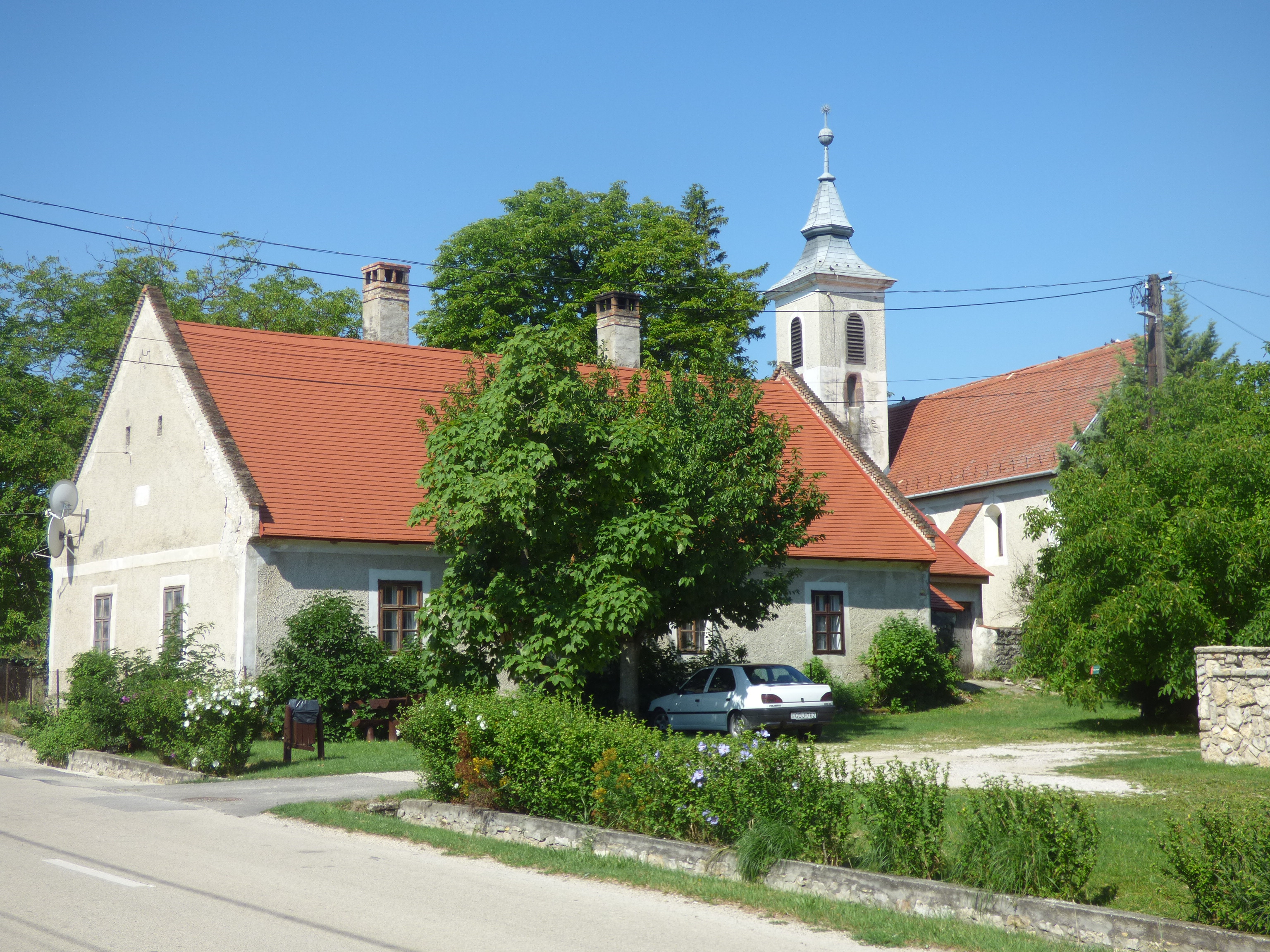 Balatonszőlős, református templom és paplak